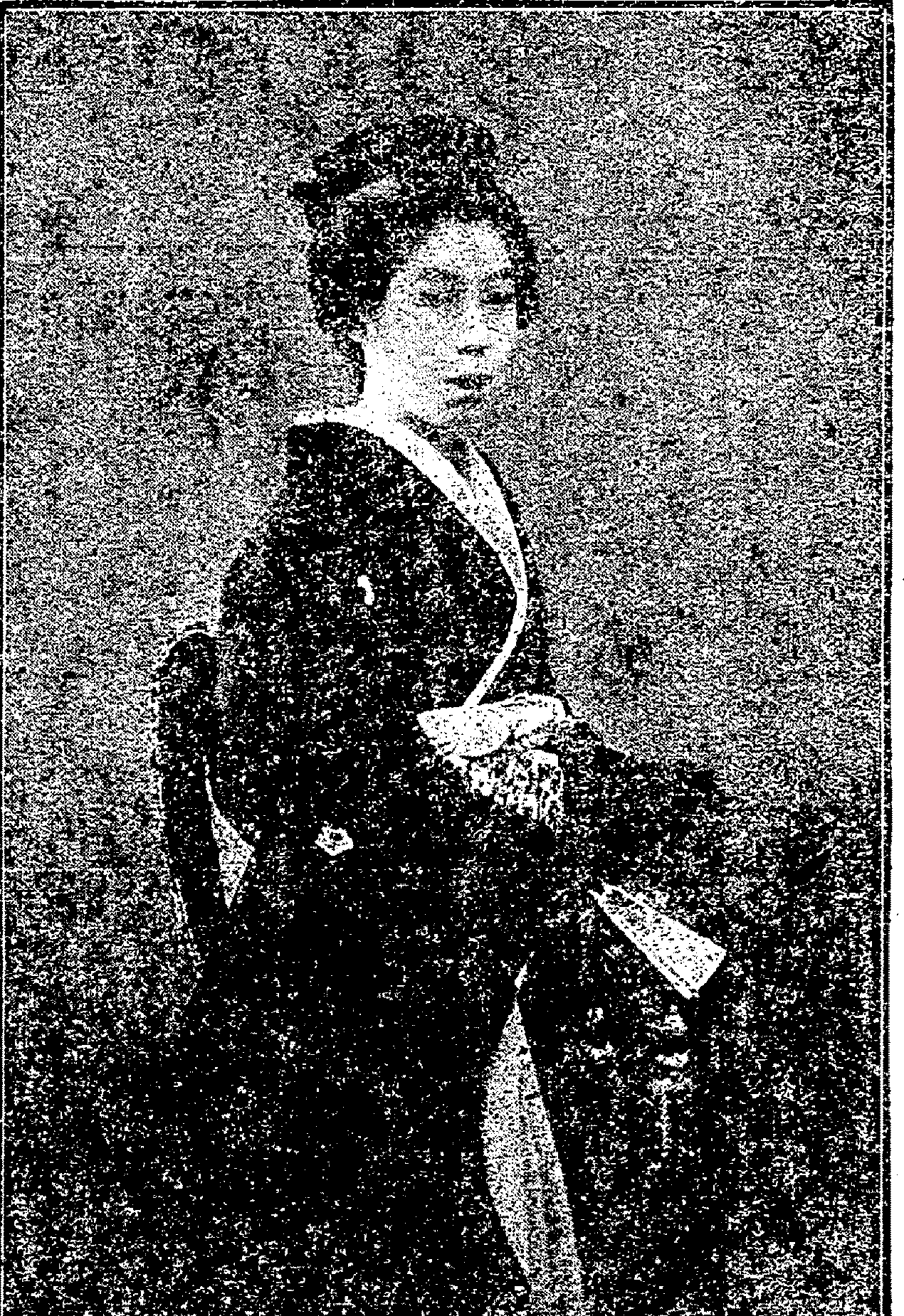 座古谷あい